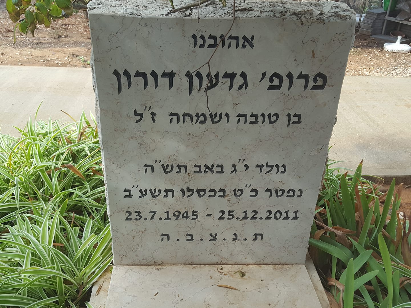 קברו של פרופ' גדעון דורון בבית העלמין בקיבוץ שפיים צילום אלי אלון